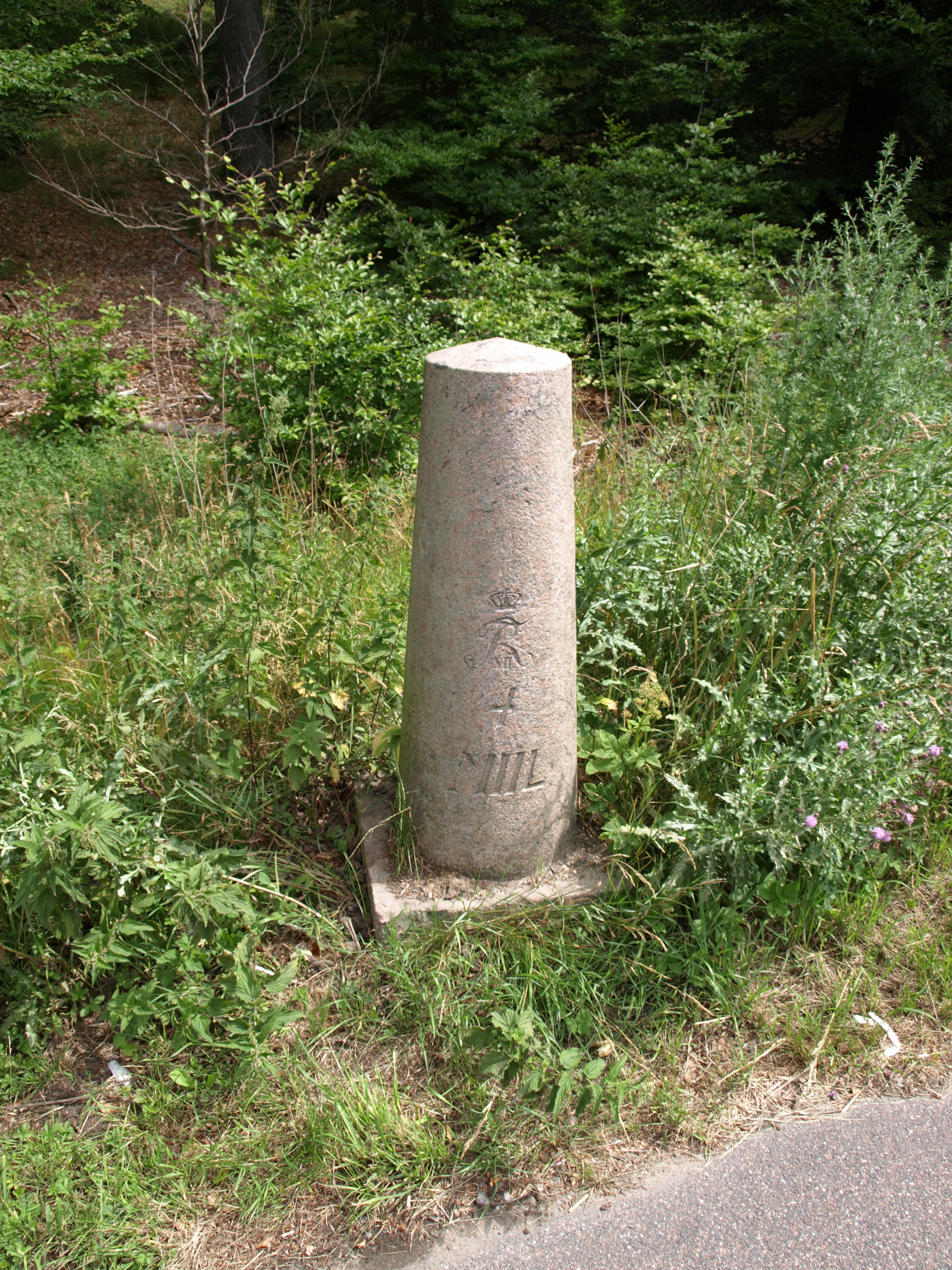 Milesten fra perioden under Frederik 7 af granit. Indskriften lyder: FR VII 4 Miil. Af typen S.J.